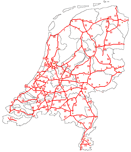 rijkswegenkaart, eigen werk